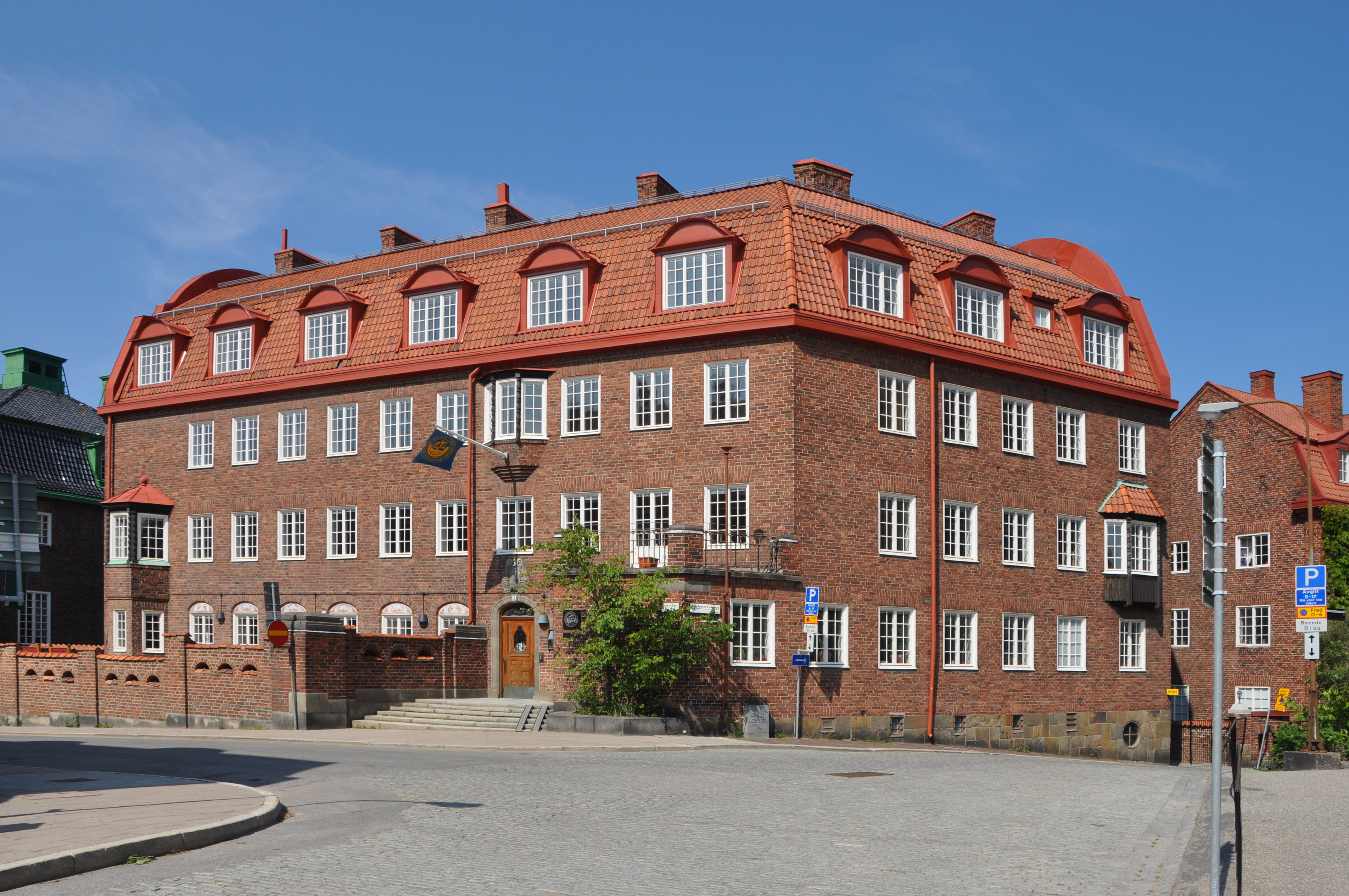 Bragevägen 2/Engelbrekts Kyrkogata 5 (Sidensvansen 6): Byggnadsår 1915-16, arkitekt Cyrillus Johansson, byggherre och byggmästare Edvard Blom